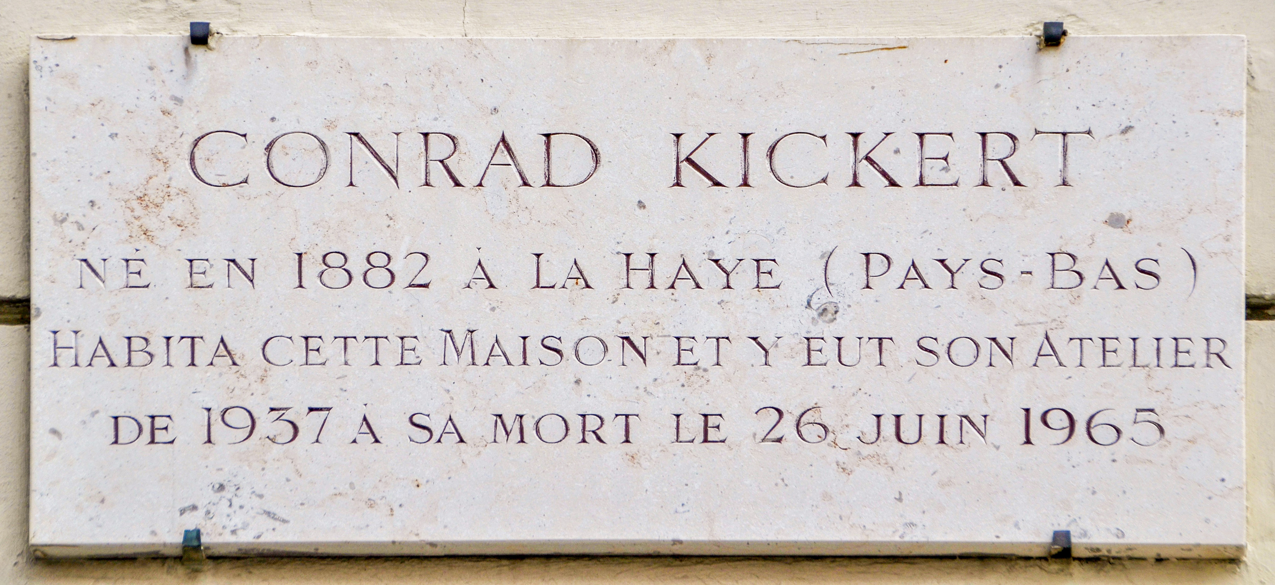 Conrad Kickert plaque - 33 rue Boissonade, Paris 14